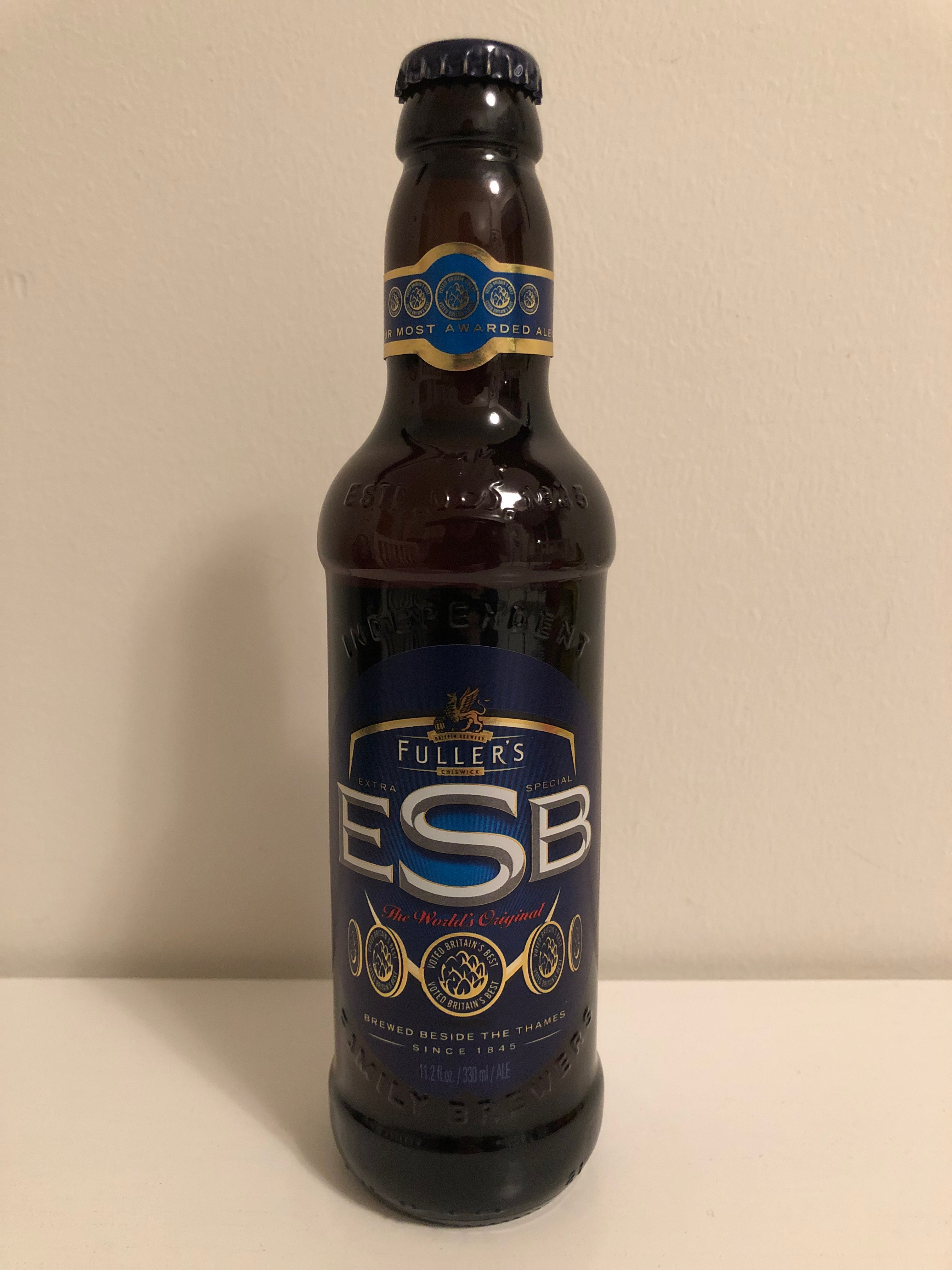 Fuller's ESB Champion Ale